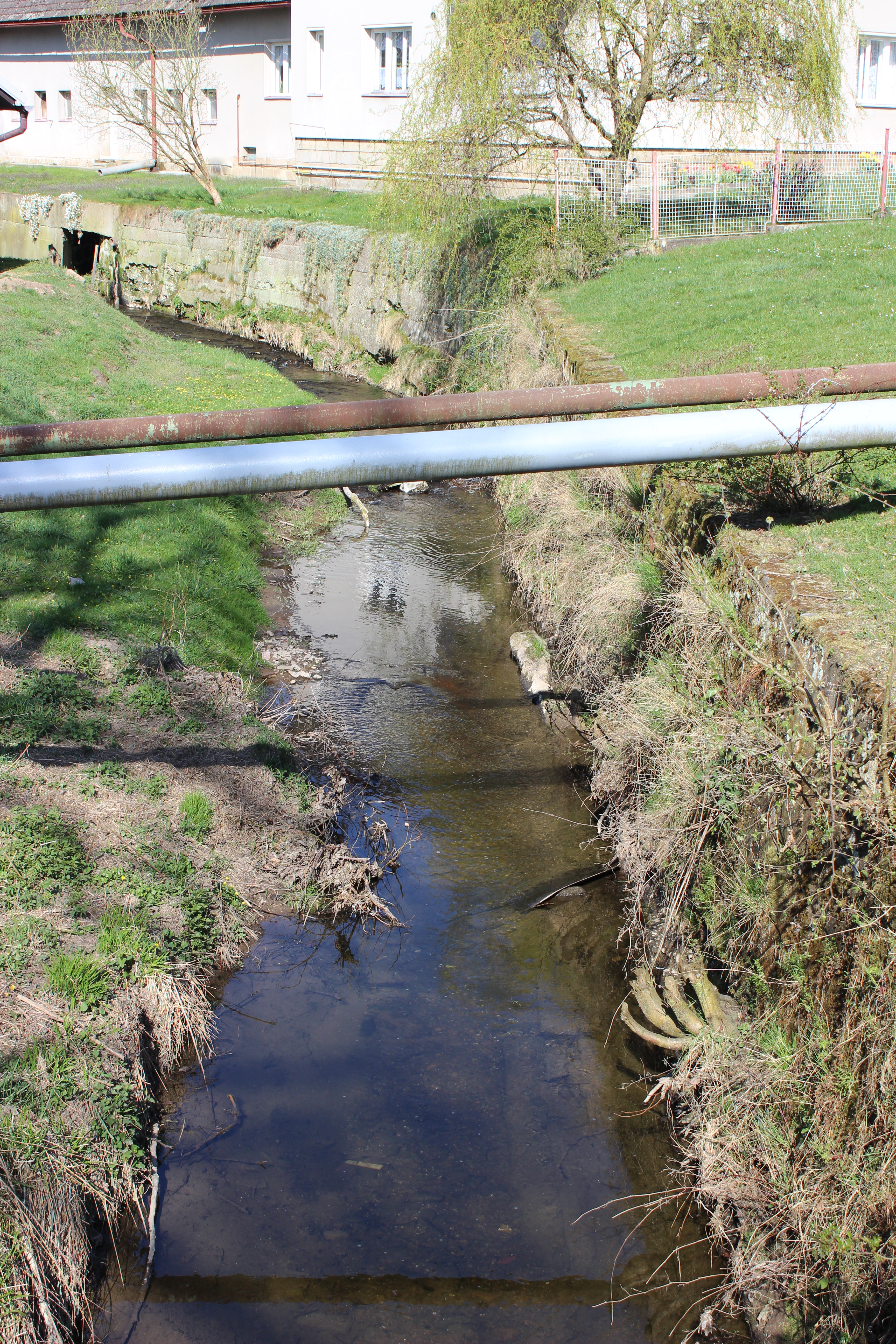 Pohled severovýchodním směrem na Stebenku v Sekerkových Loučkách, části Mírové pod Kozákovem.